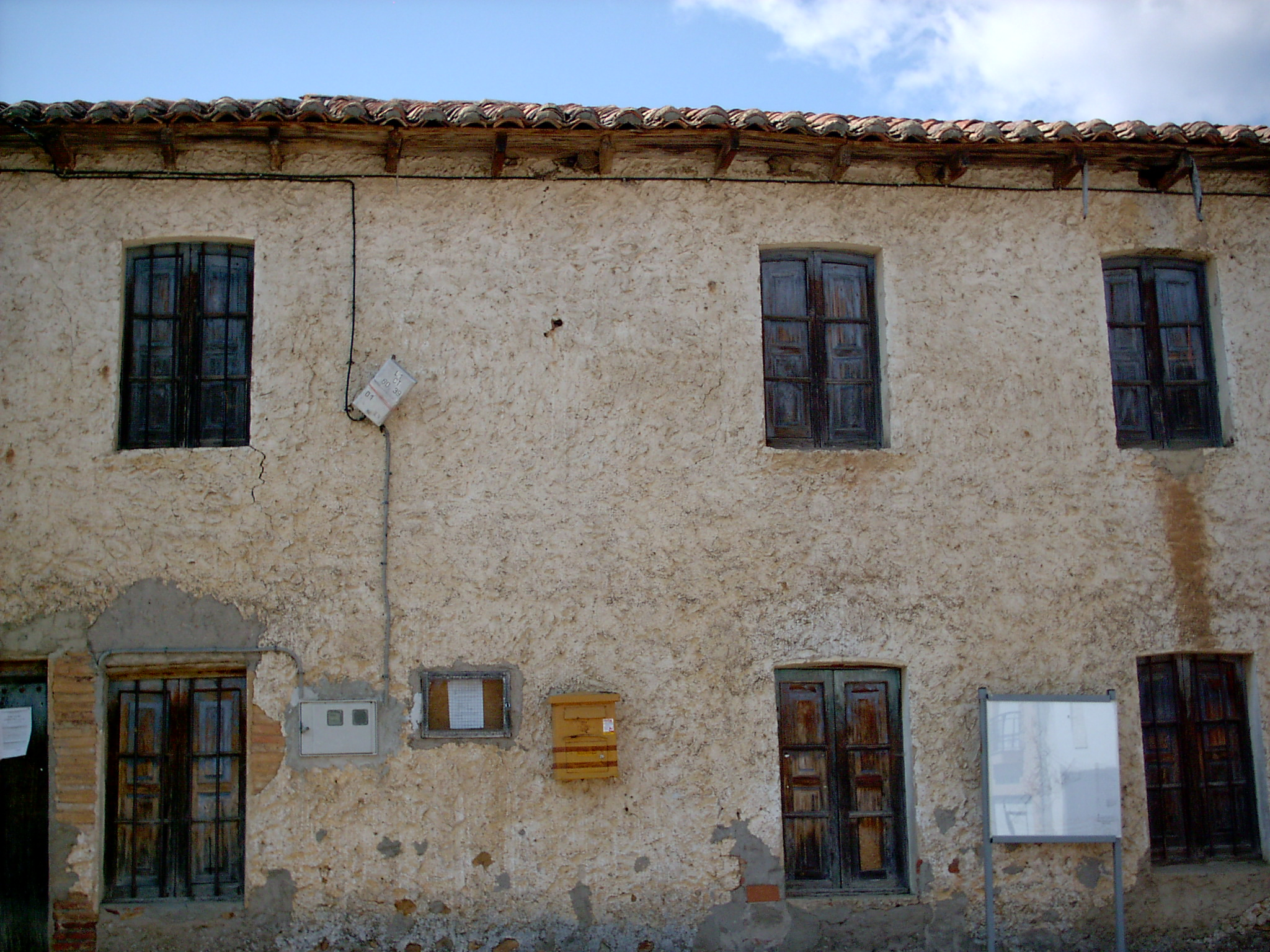 Antigua escuela.